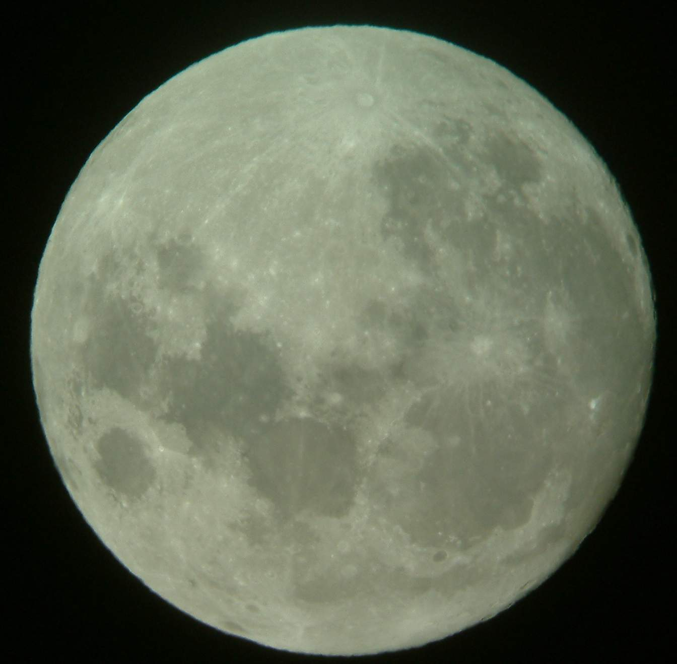 Photo réalisée par Yves 28 sep 2004 à 11:02 (CEST)